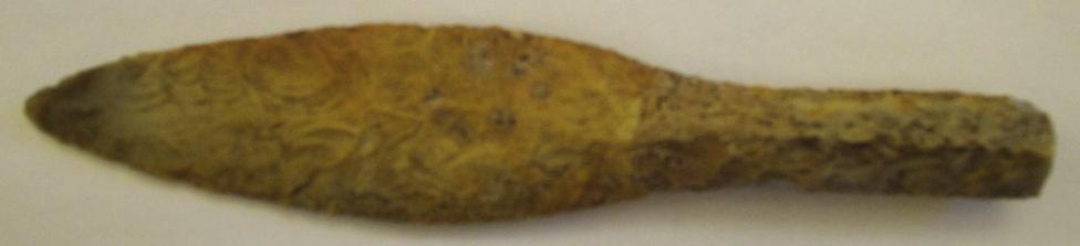 Senneolitisk flintdolk från Skåne, lösfynd, fotograferad av Harri Blomberg, den 18 oktober 2005.